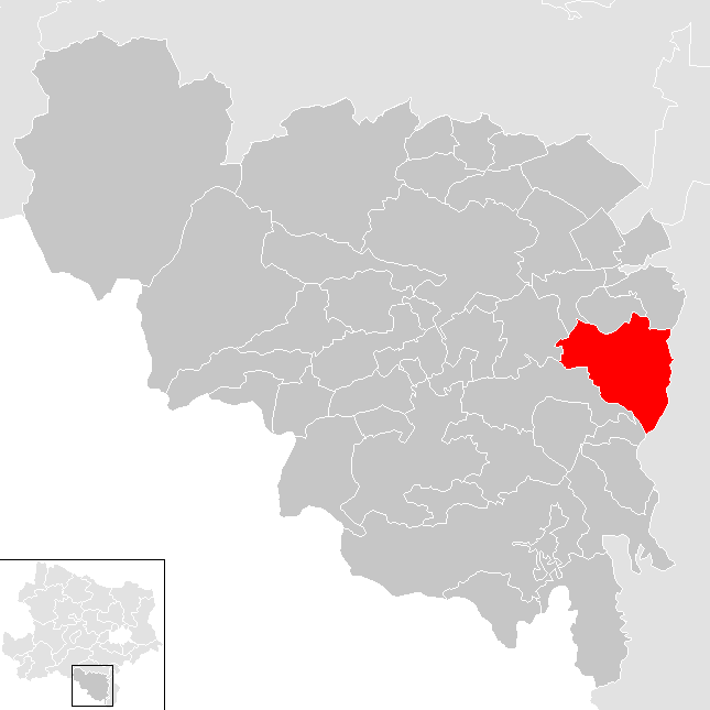 Bezirk Neunkirchen